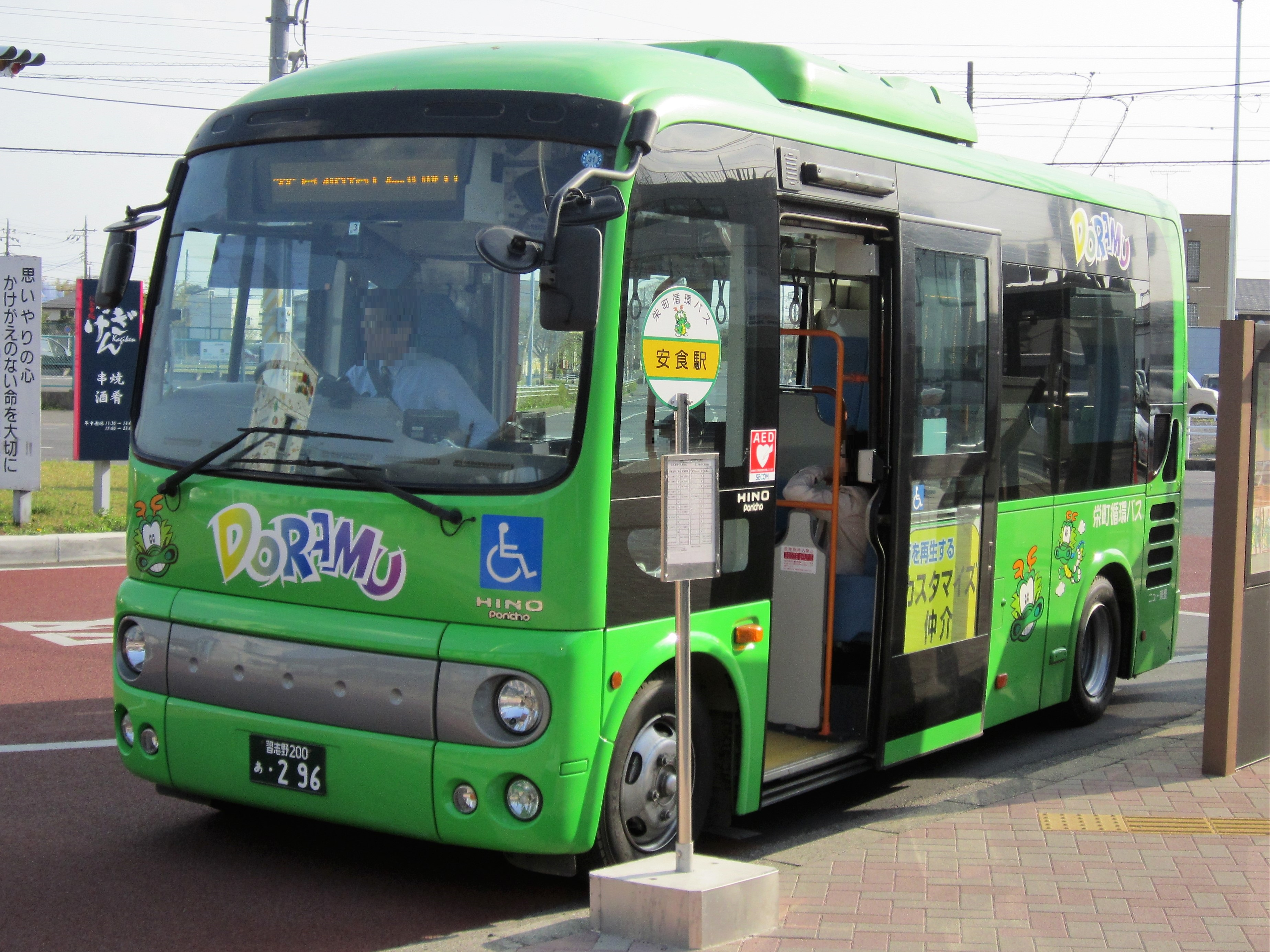 栄町循環バス（安食駅にて） Canon PowerShot A2200